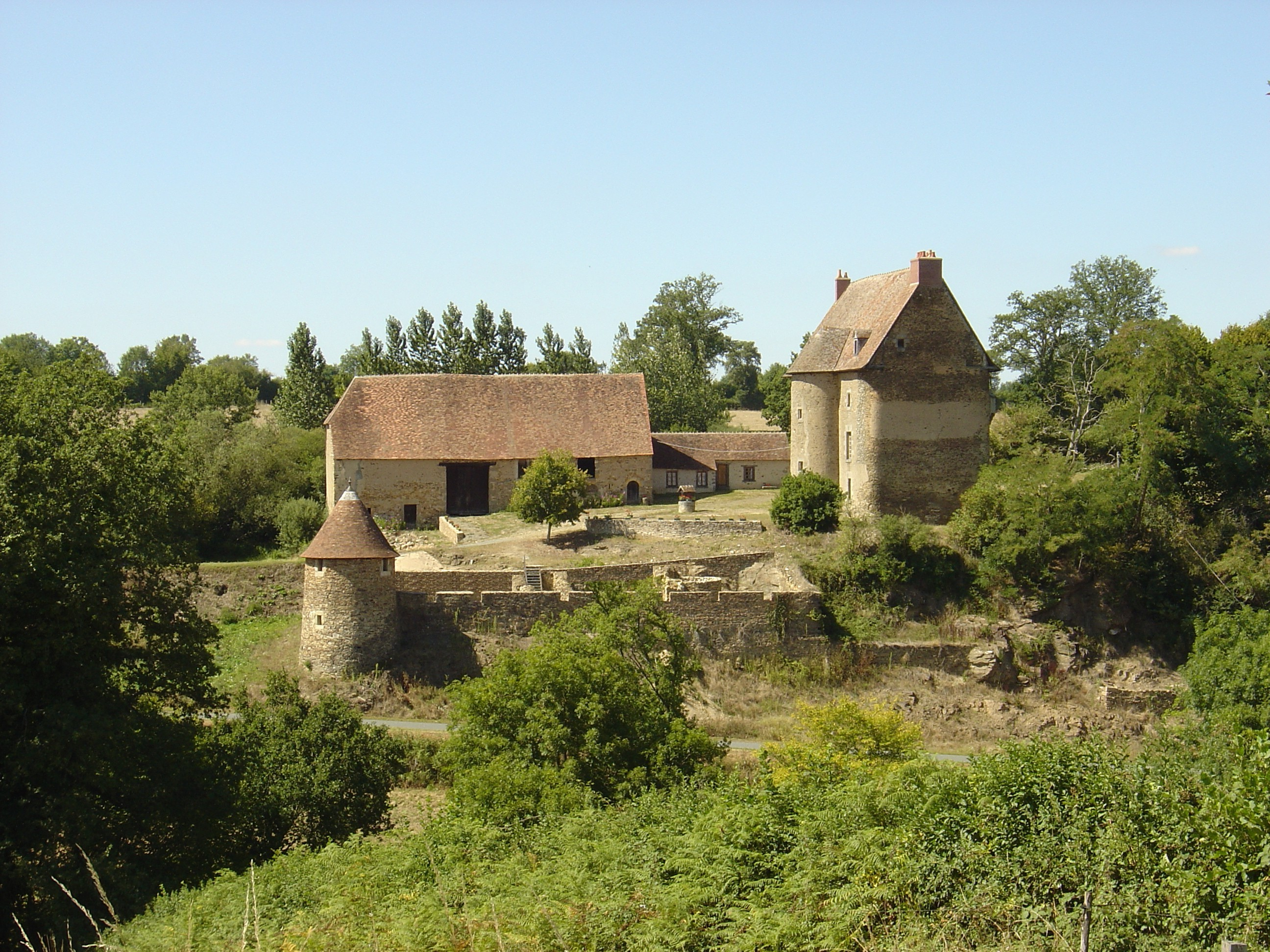 Château du Mont - Vue générale